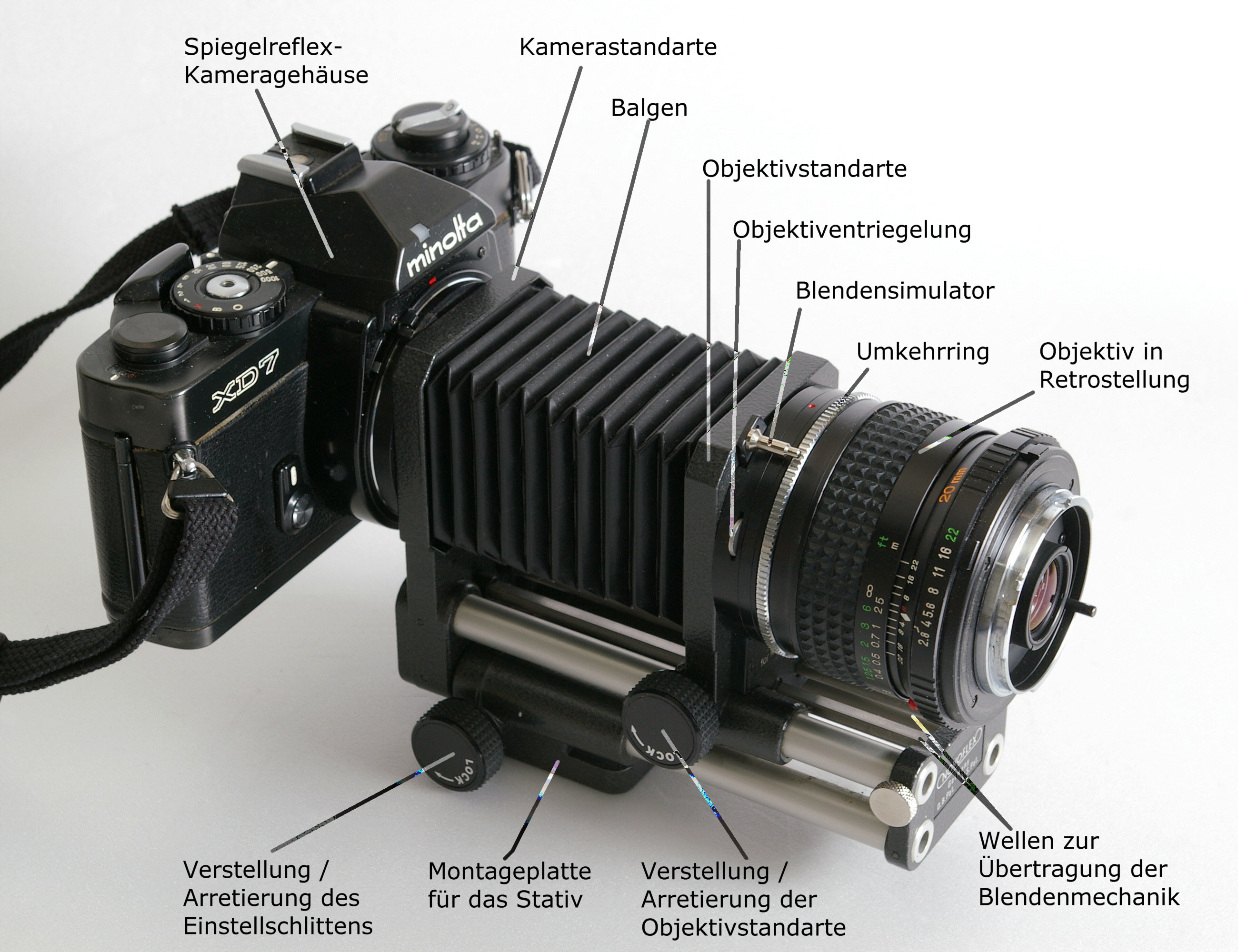 Novoflex BALMIN-AS montiert an einer Minolta XD-7. Objektiv MD 2,8/20mm mit Umkehrring in Retrostellung. In dieser Kombination kann eine Vergrößerung von etwa 9:1 erreicht werden. Durch die Retrostellung können keine Objektivfunktionen an die Kamera übertragen werden. Deutsche Beschreibung der Funktionen.